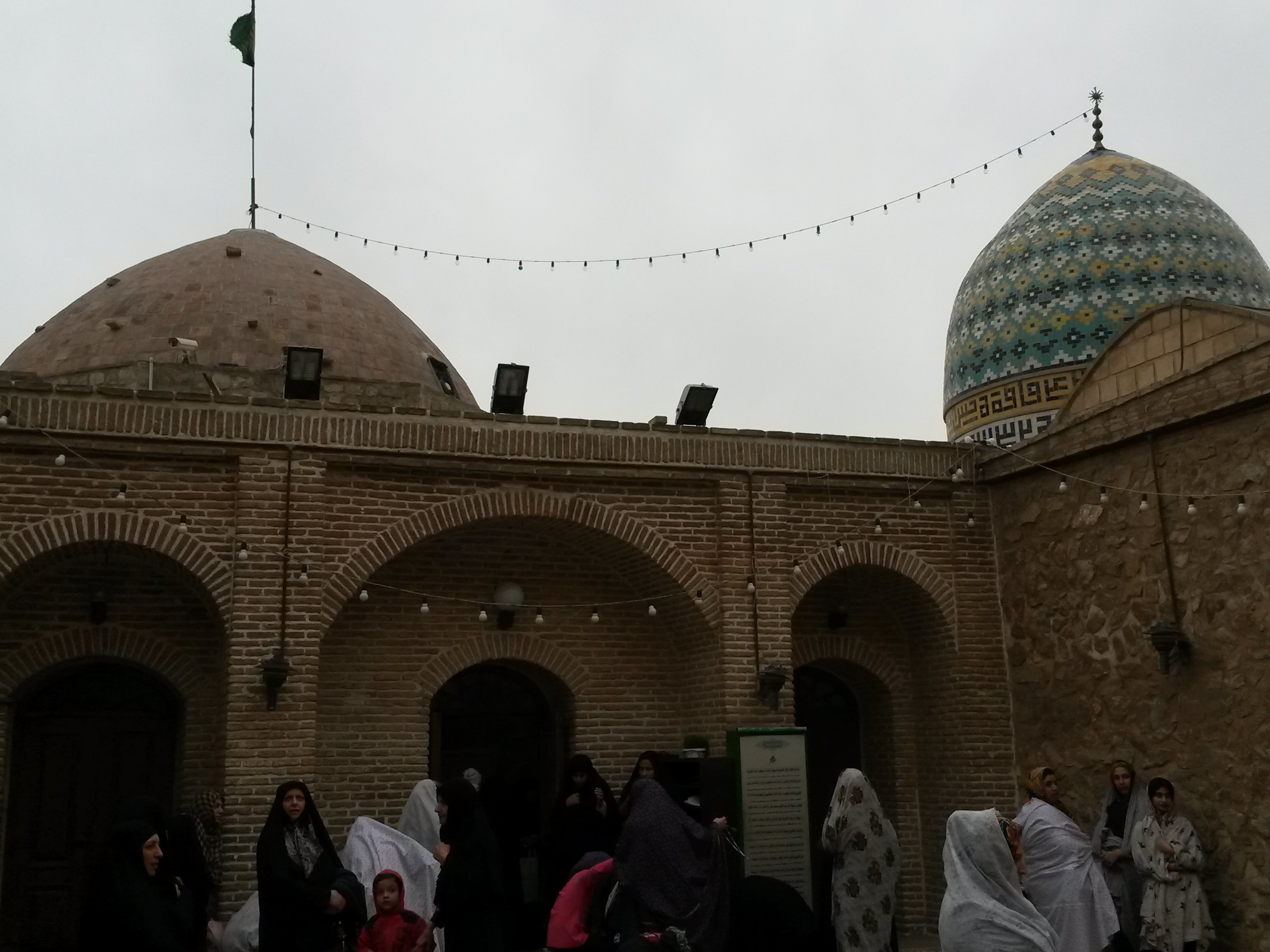 بقعه بی بی شهربانو در شهر ری